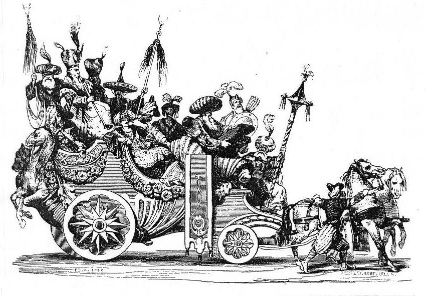 Le char des artistes français au Carnaval de Rome en 1748, dessiné par Vien.